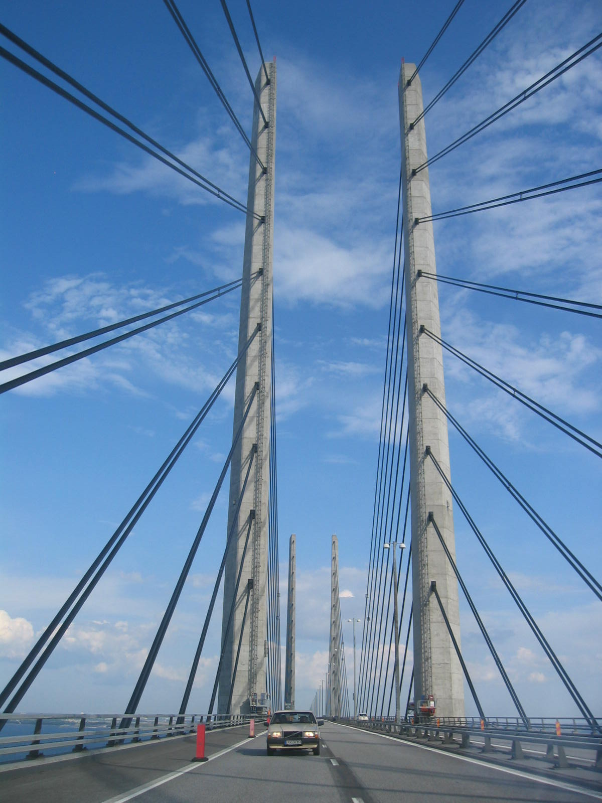 Die Öresundbrücke in der Mitte.